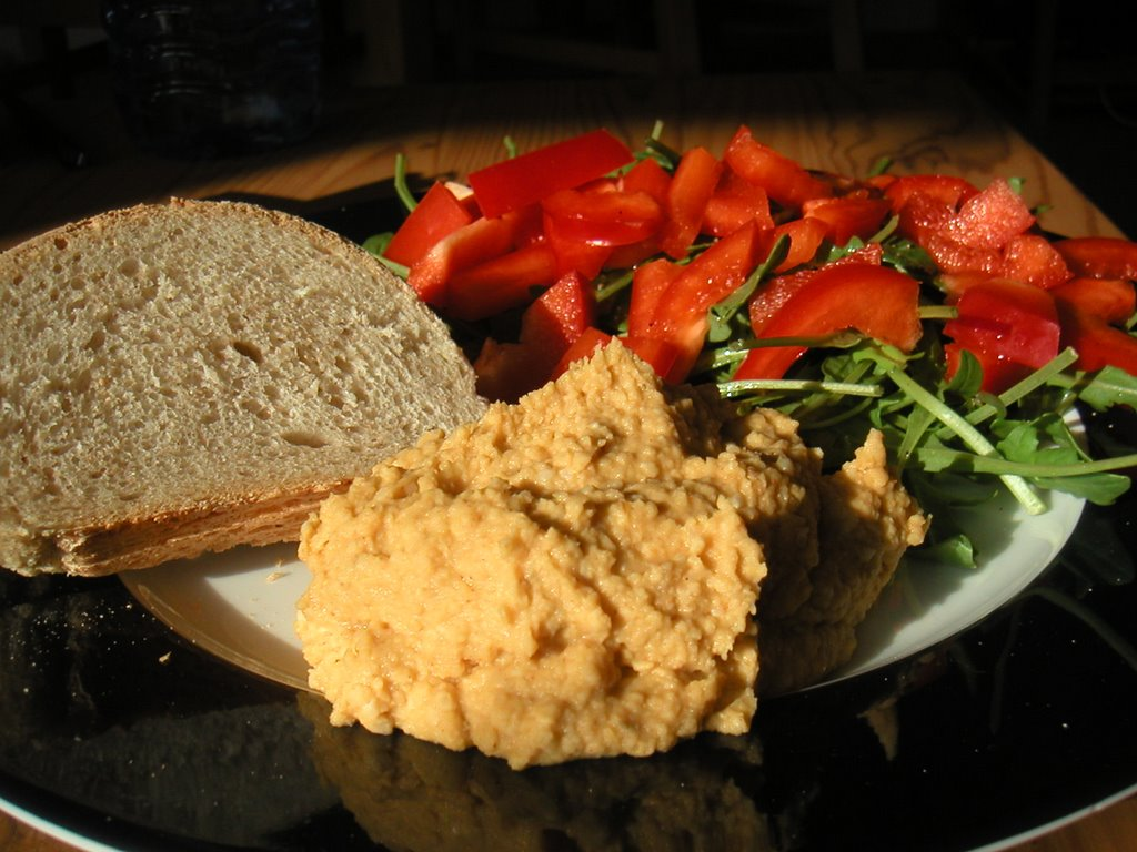 Brød, hummus og salat